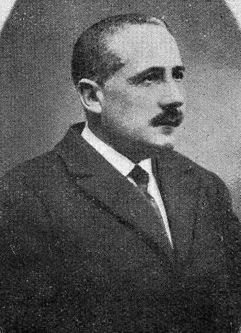 José María Moar Fandiño, fotografía en Vida Gallega 1932